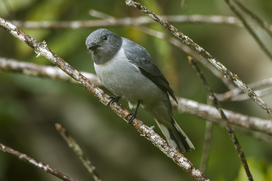 Ashy Cuckoo-Shrike - Andasibè - Madagascar_S4E7706